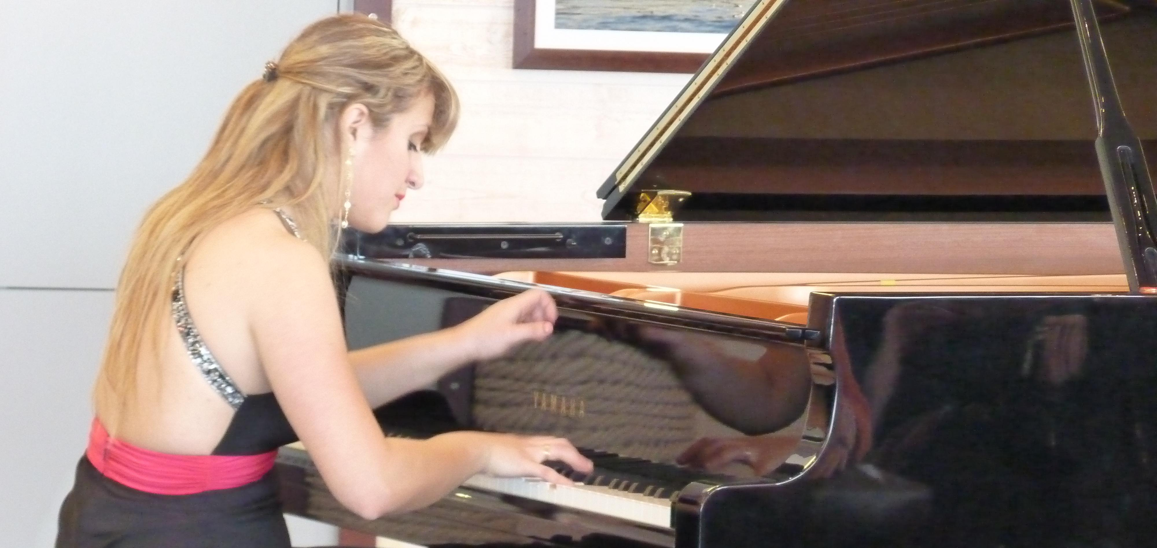 Concert Festival "Classique au large", St Malo